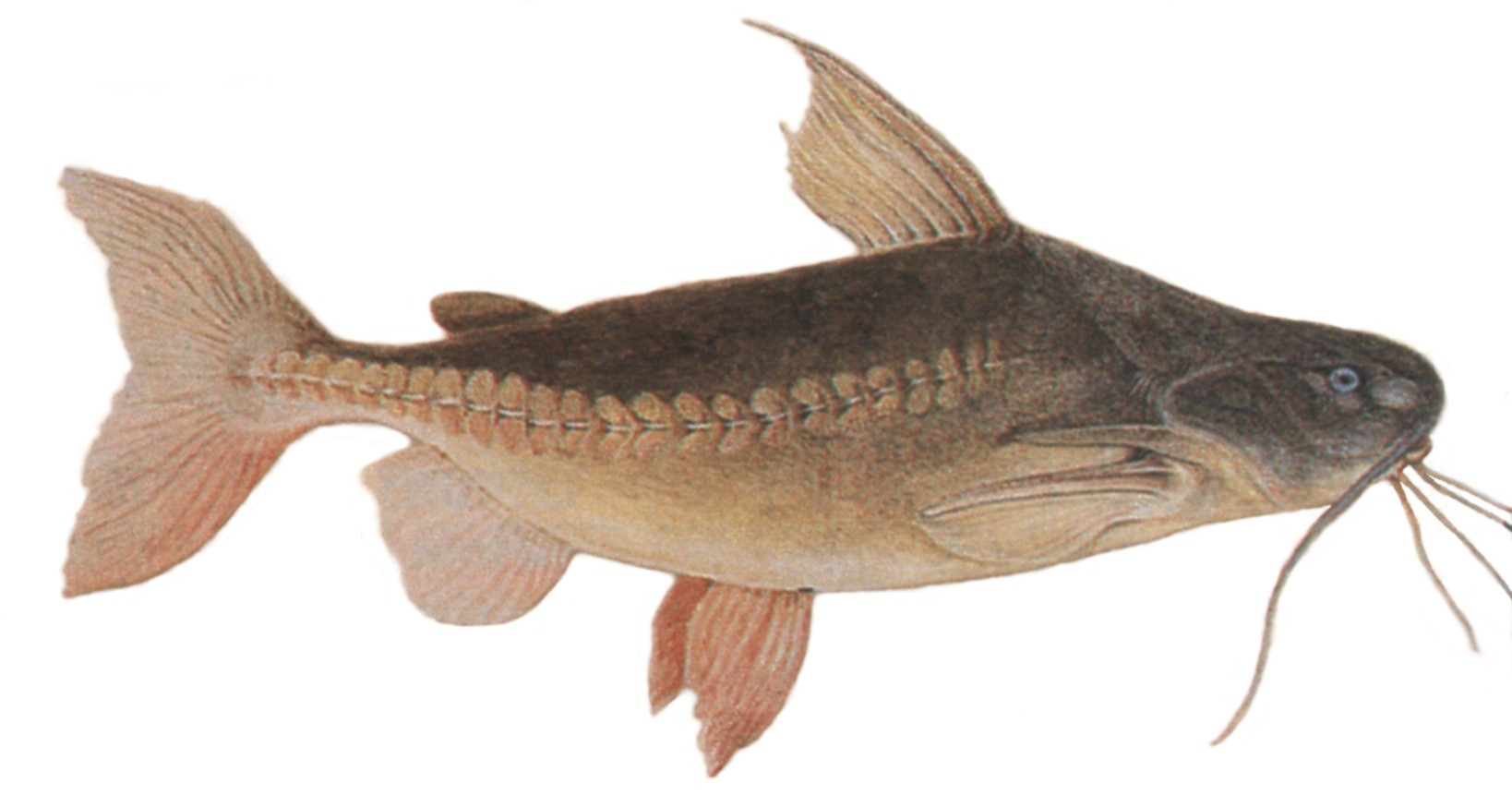 Desenho de um abotoado (Pterodoras granulosus), por Johann Natterer, parte da missão ao Brasil de naturalistas do imperador austríaco Francisco I, de 1817 a 1835